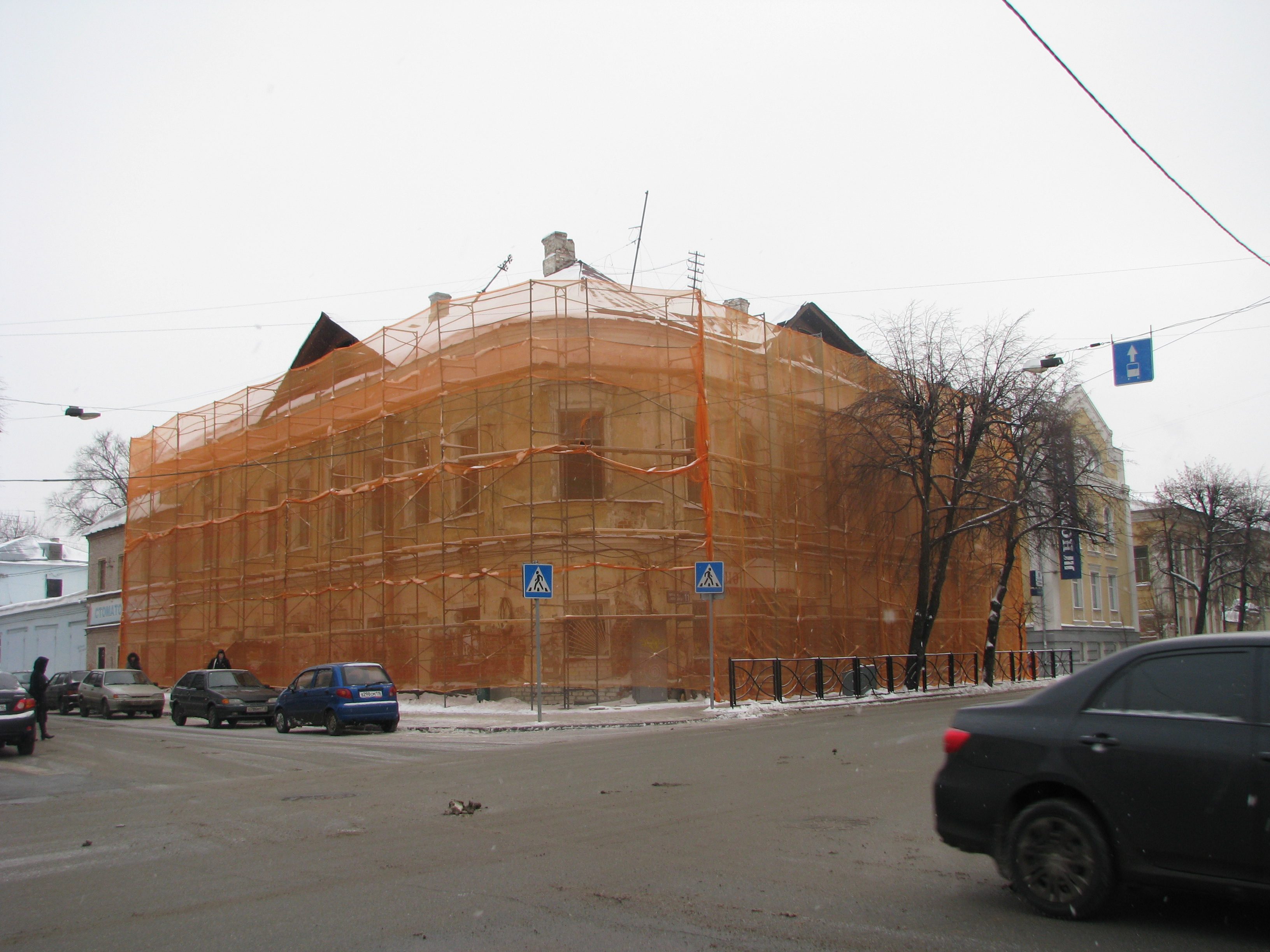 Главный дом городской усадьбы Урванцовых - К.Маркса,11, Казань.